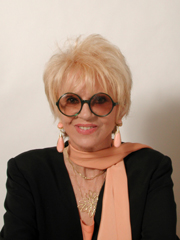 Franca Rame eletta al Senato